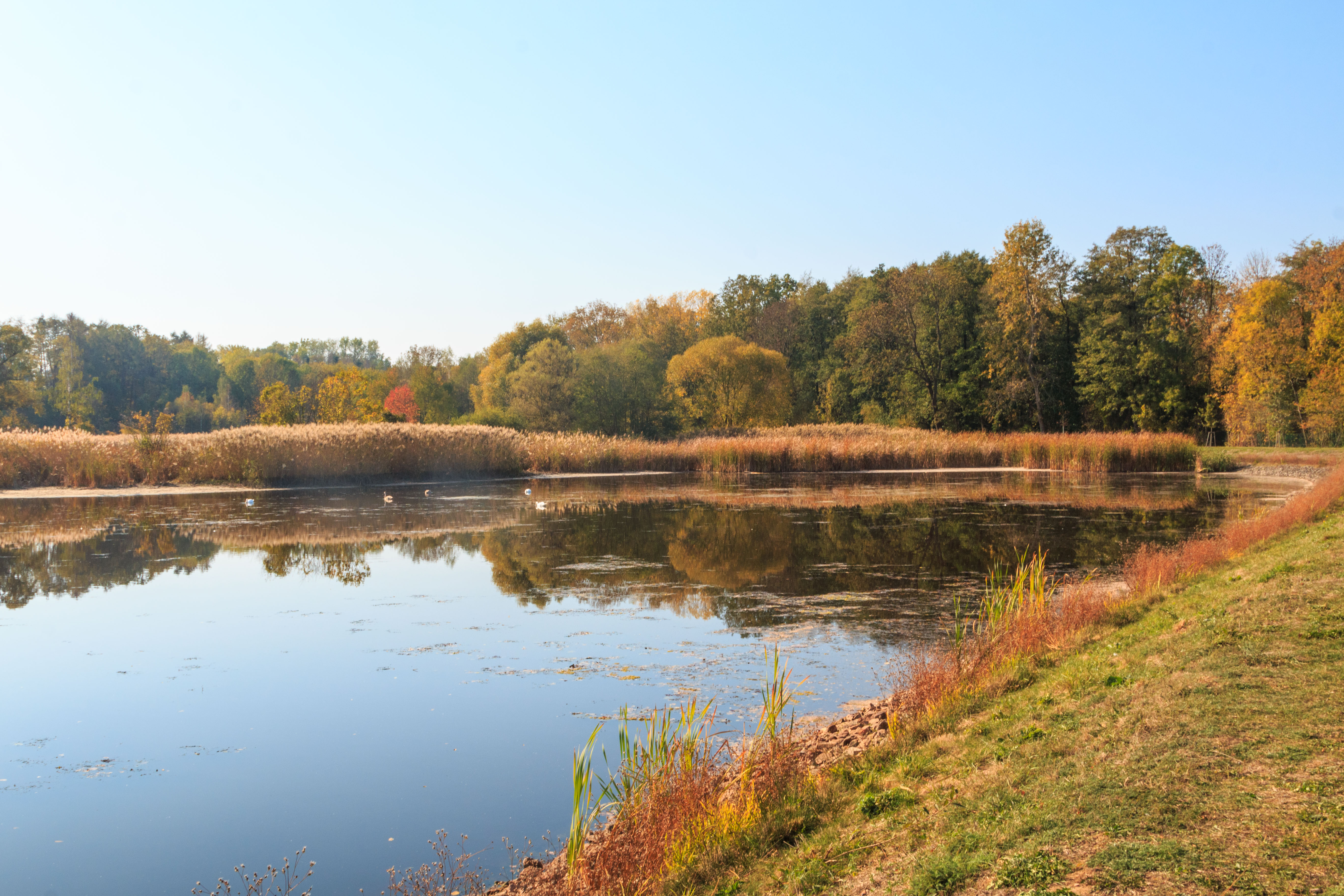 Přírodní památka Farář u Bítovan Project: Vodstvo Ticket: 1617.